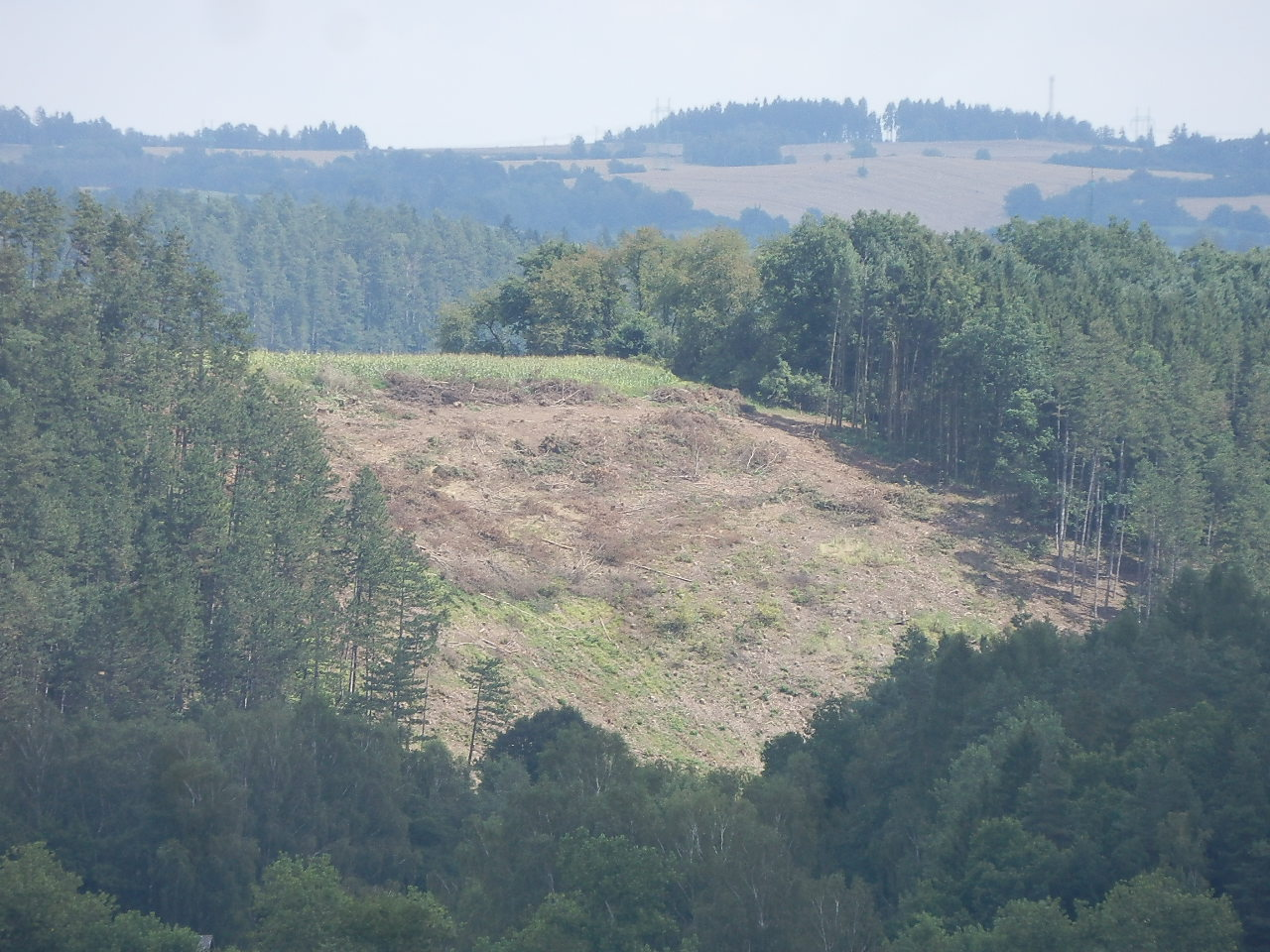 Příklad současného lesního hospodářství, takzvaně soukromý les.